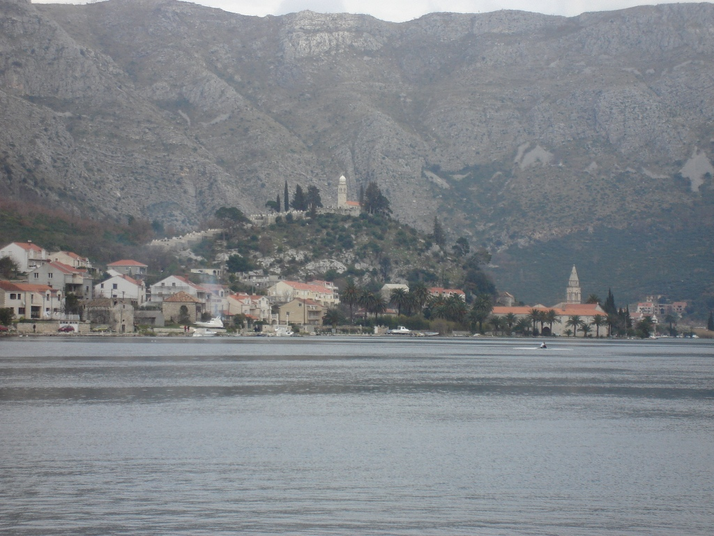 Village Rožat near Dubrovnik